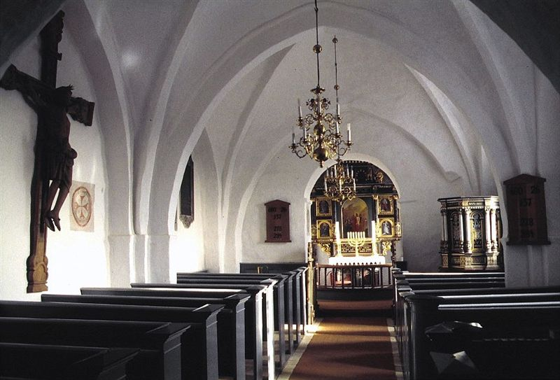 Sønder Asmindrup Kirke i Danmark. Skibet set mod øst